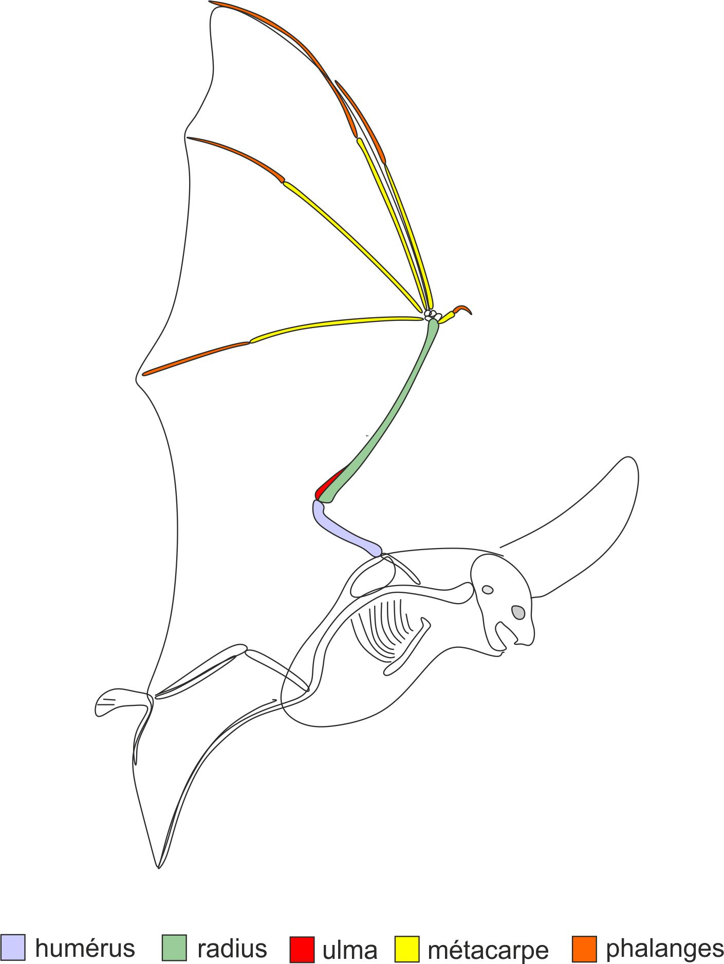 Les membranes alaires sont tendues entre 4 doigts; seul le pouce reste libre.